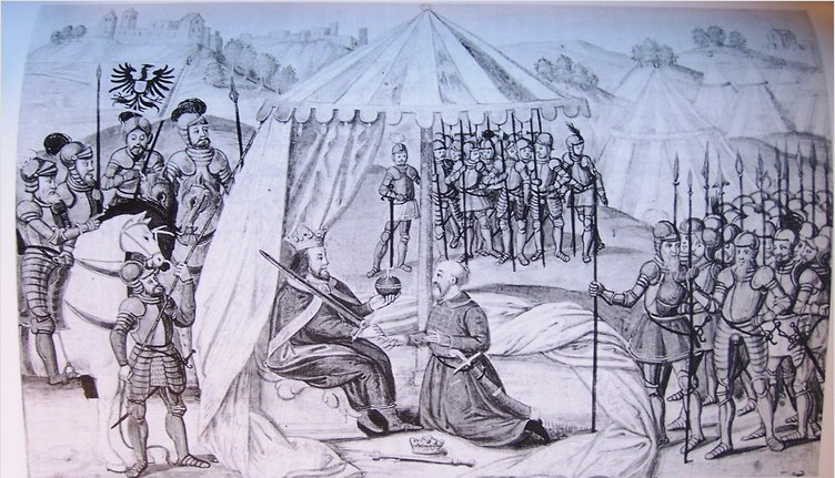 Přemysl Otakar II. skládá hold Rudolfovi Habsburskému